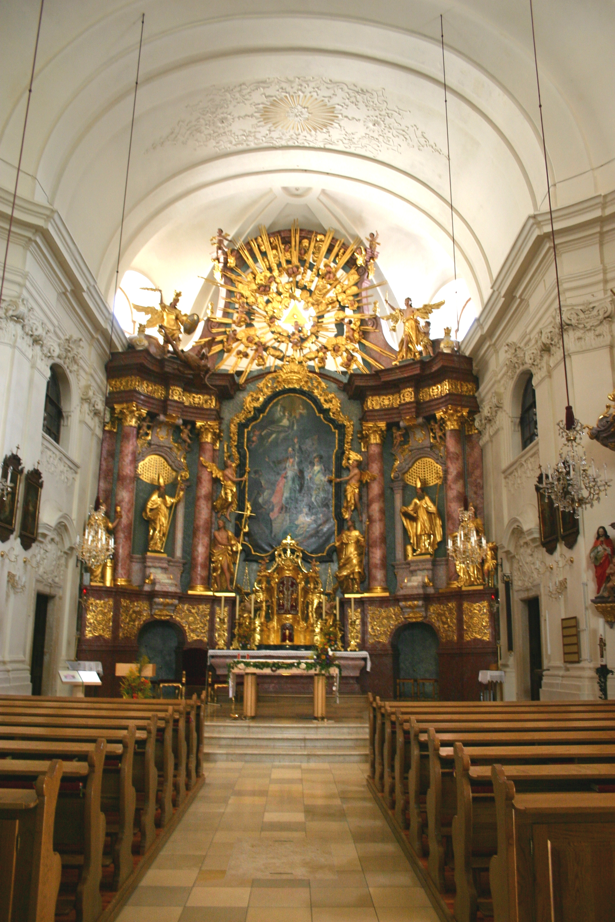 Kirchberg am Wechsel Pfarrkirche Sankt Jakob Hauptaltar